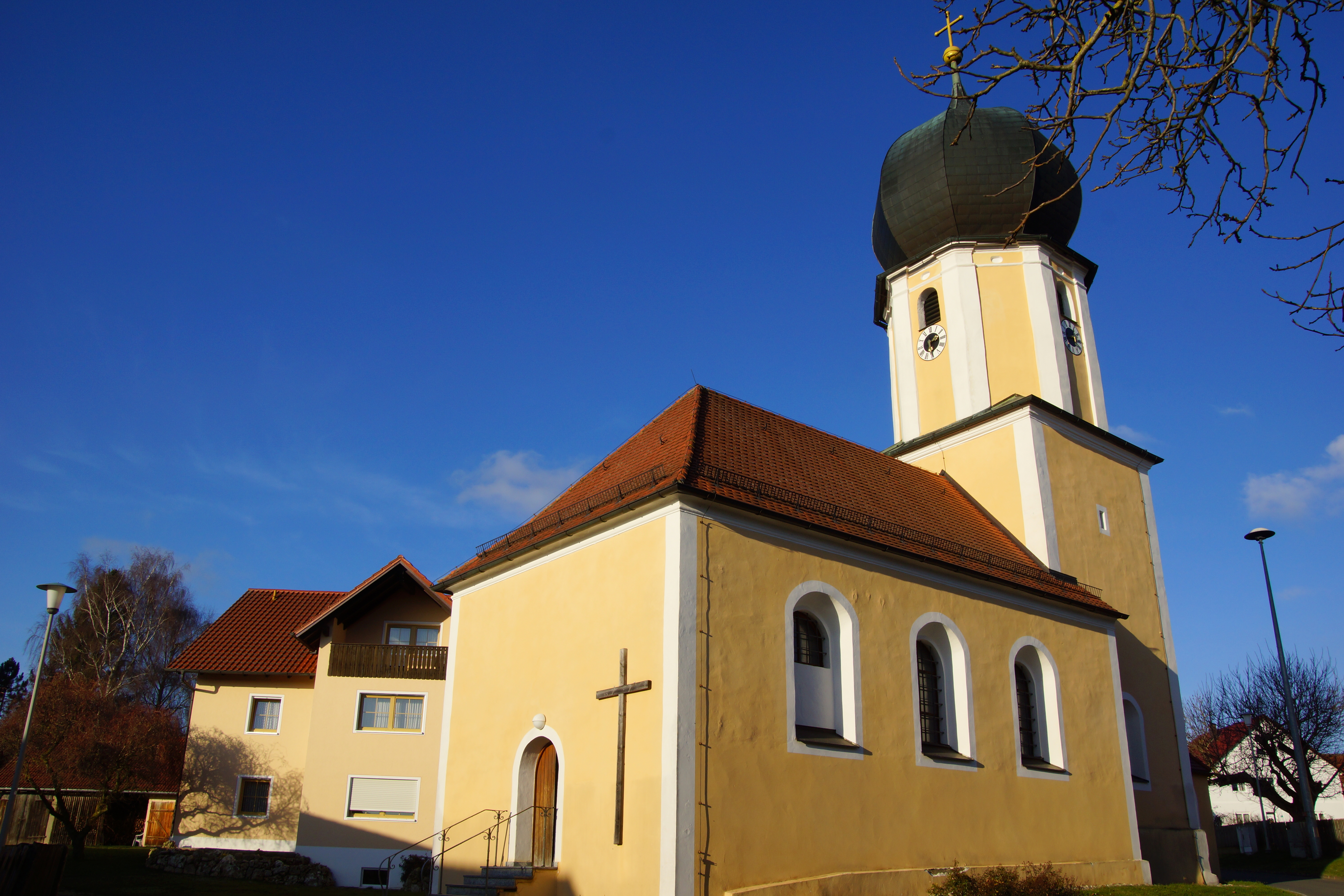 Die katholische Filalkirche im Oberpfälzer Rasch bei Breitenbrunn